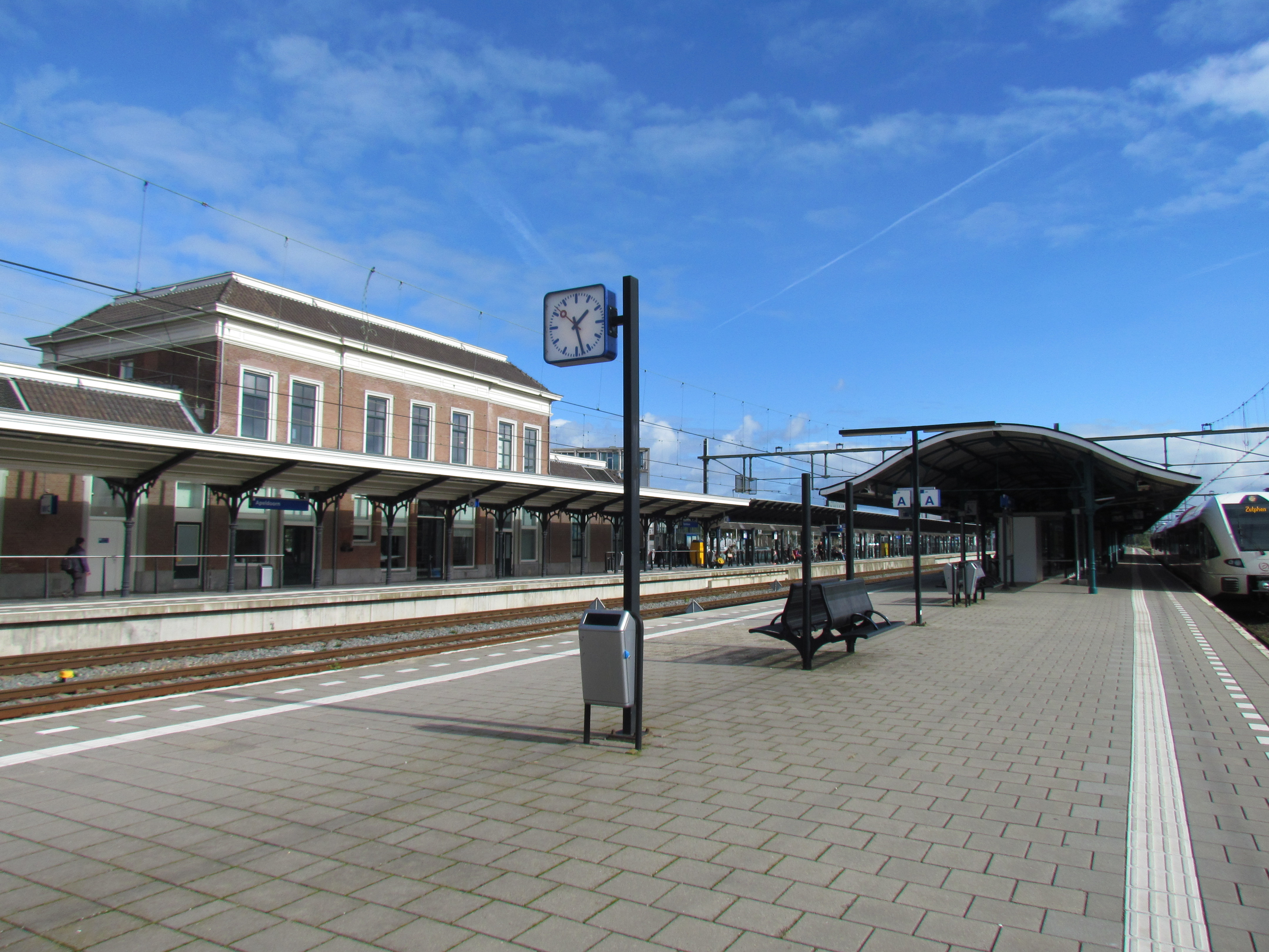 Station Apeldoorn (NL). Links het stationsgebouw en spoor 1, rechts perron 3/4 met de oorspronkelijke overkapping